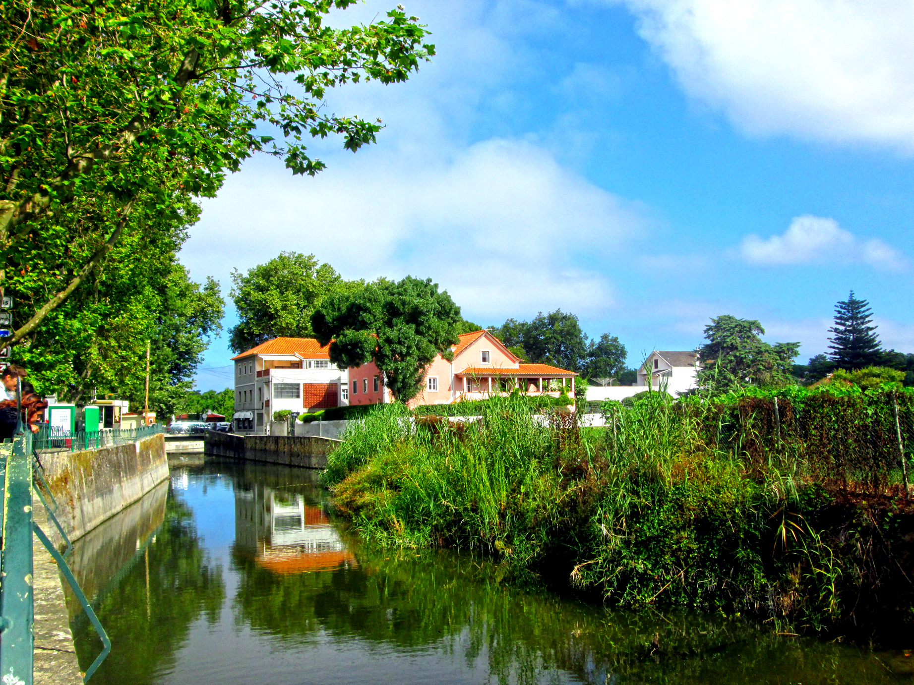 Colares river, in Várzea de Colares